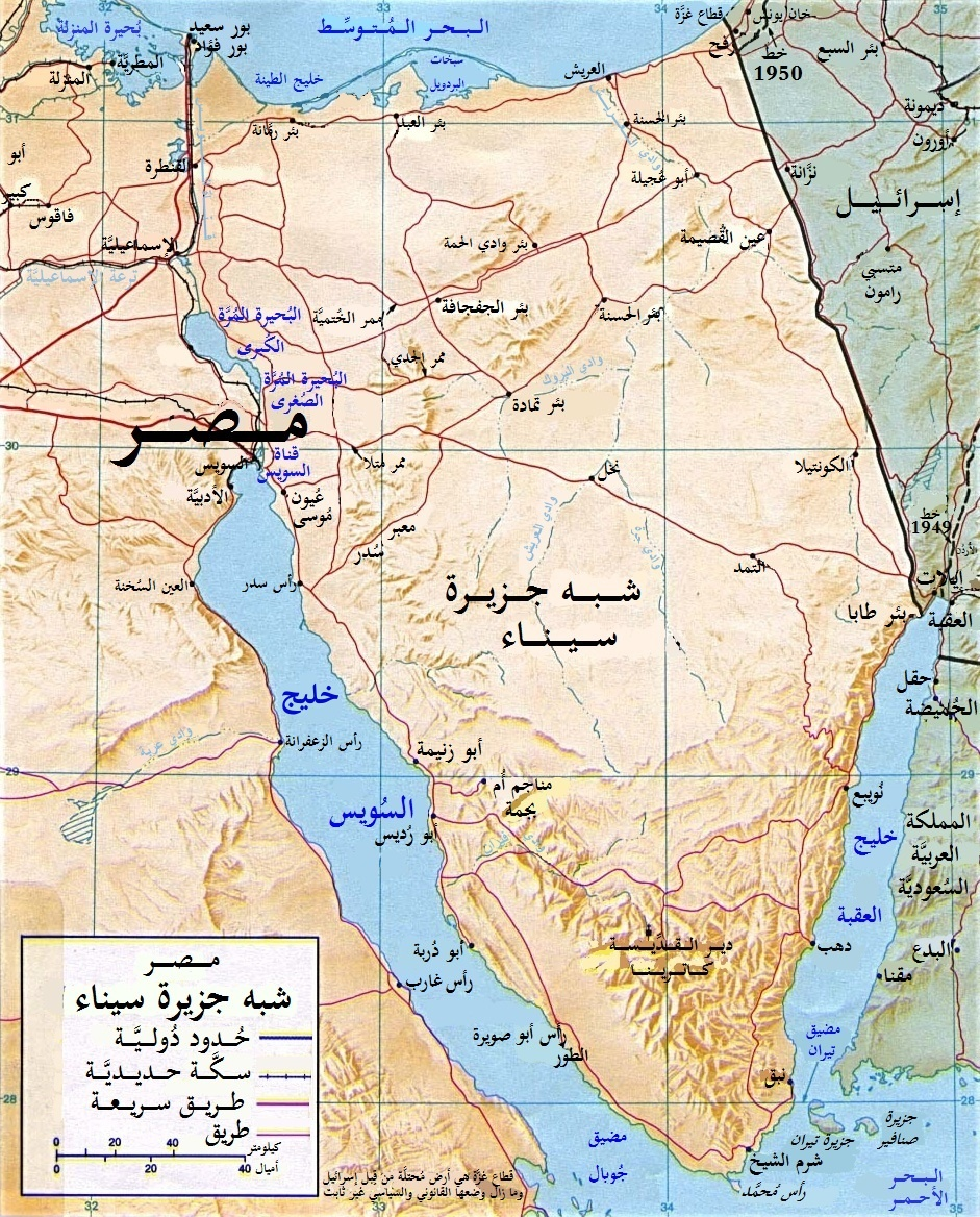 خارطة لِشبه جزيرة سيناء في سنة 1992م. صُنعت النسخة الأصليَّة من قبل وكالة المُخابرات المركزيَّة الأمريكيَّة.